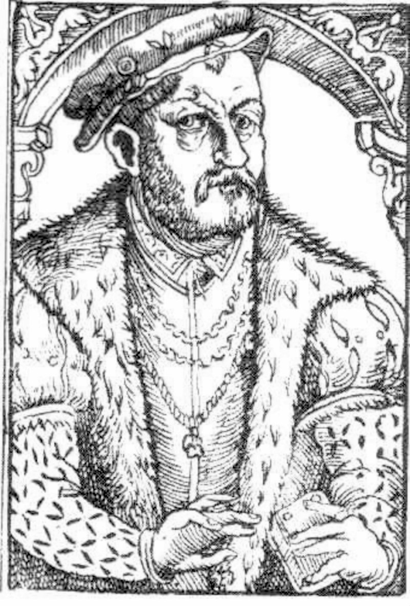 Mikolaj Rej